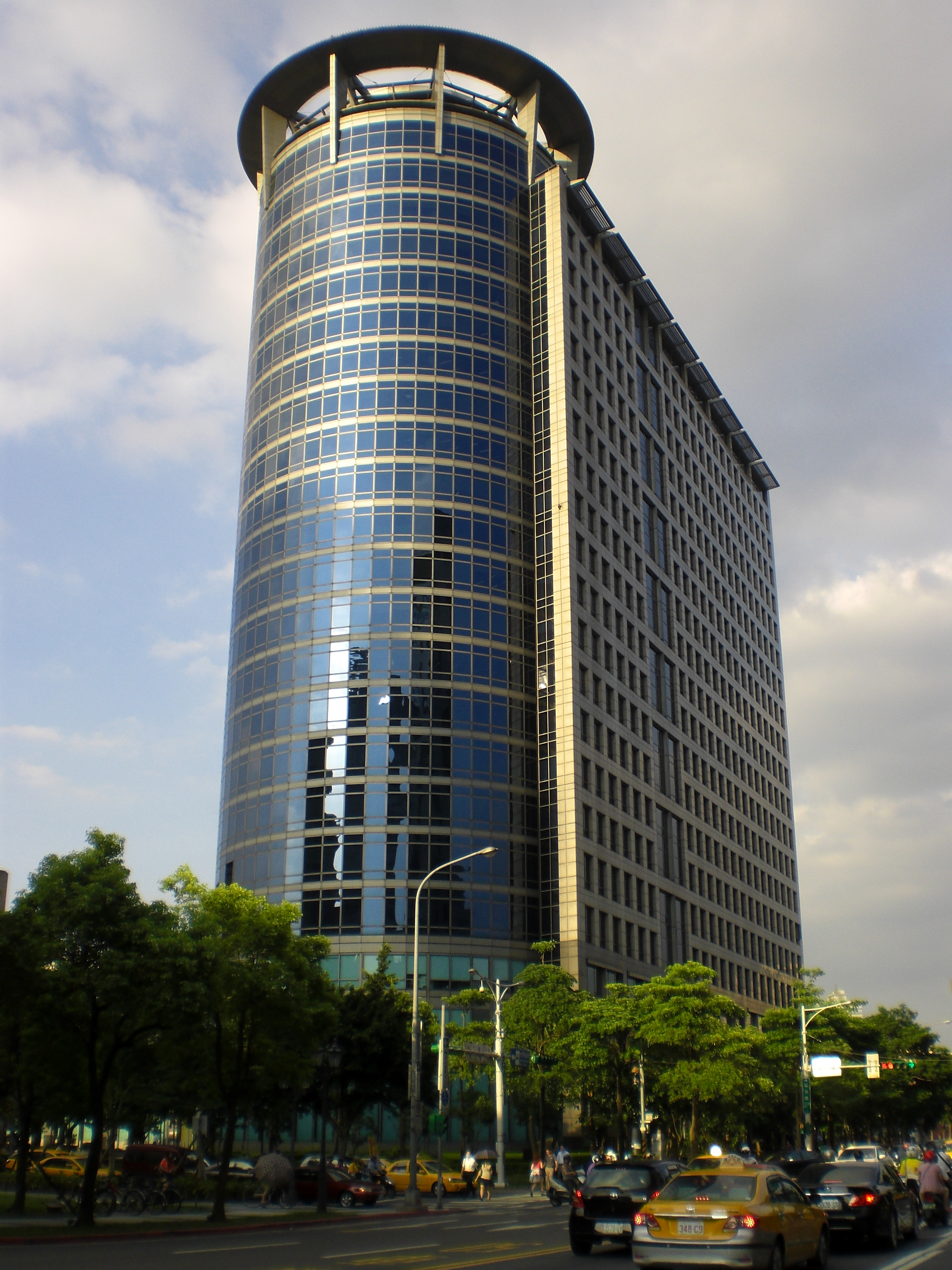 中文（台灣）: 中油大樓。